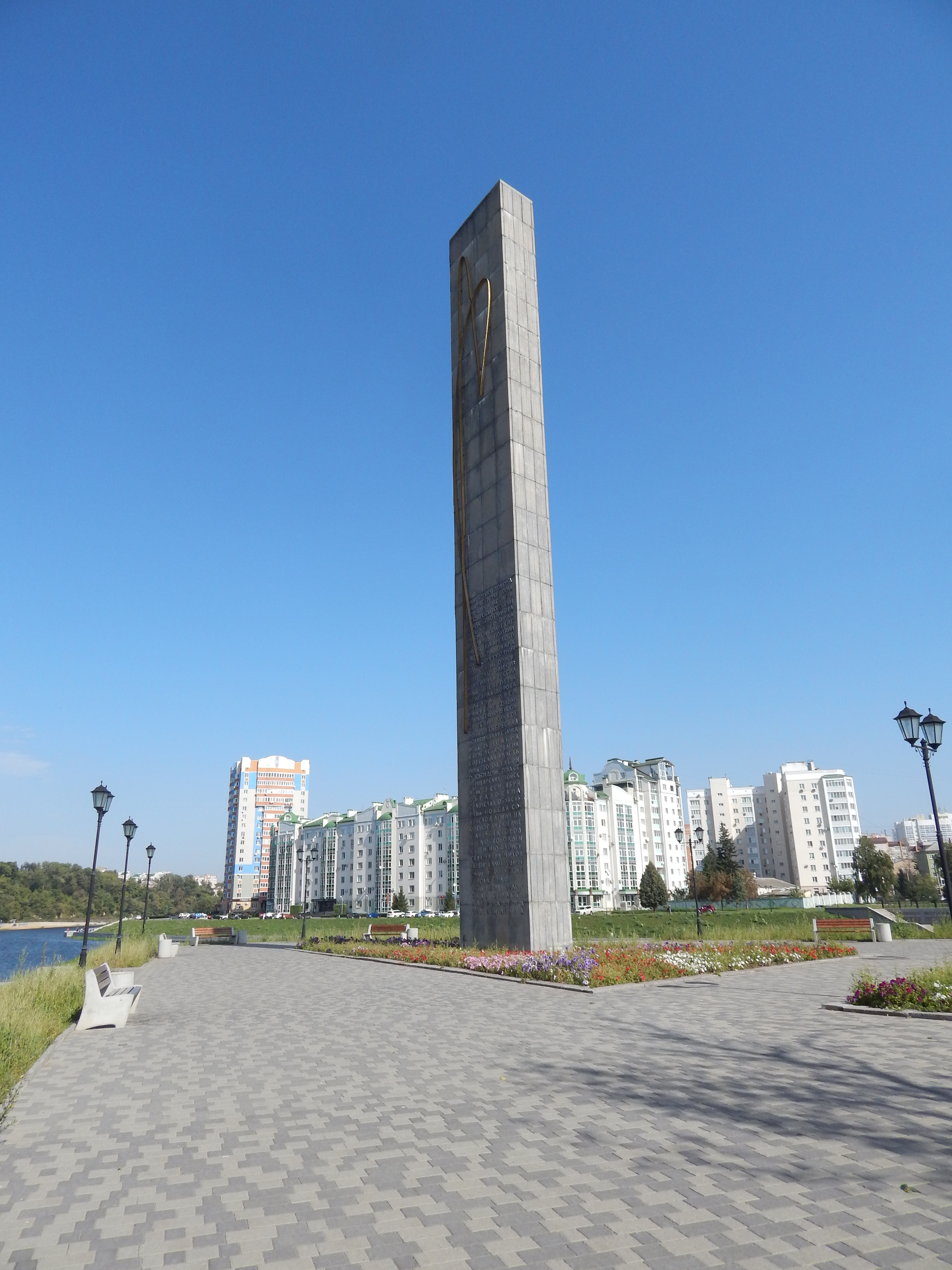 Памятник 400-летию Орла: устье реки Орлик, Орёл, Орловская область